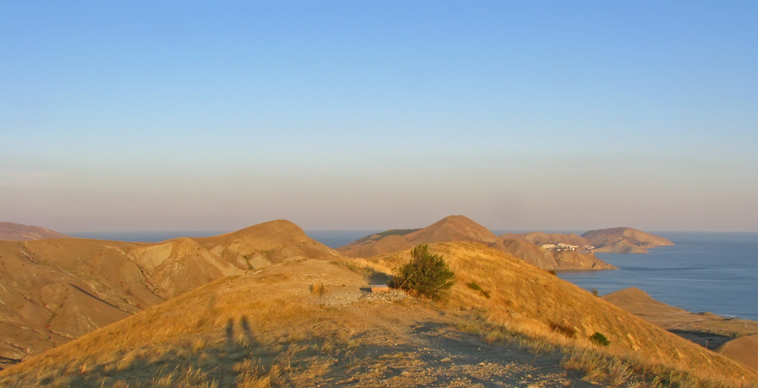 Могила поета і художника М. О. Волошина, смт Коктебель, гора Кучук-Єнішар (2 км на північ від селища)